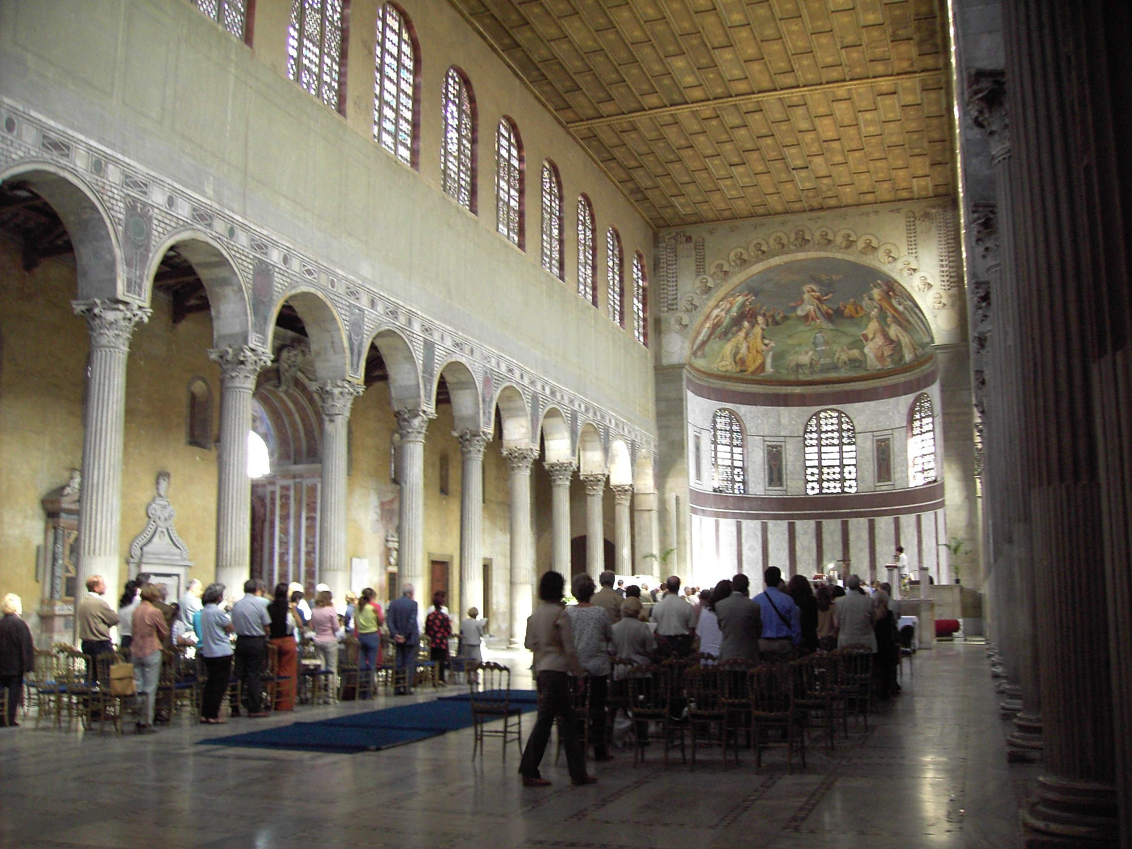 Roma, santa Sabina (interno) by Lalupa 2005 - PD